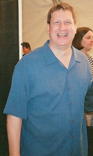 Lee Strobel, taken 2007-10-21.